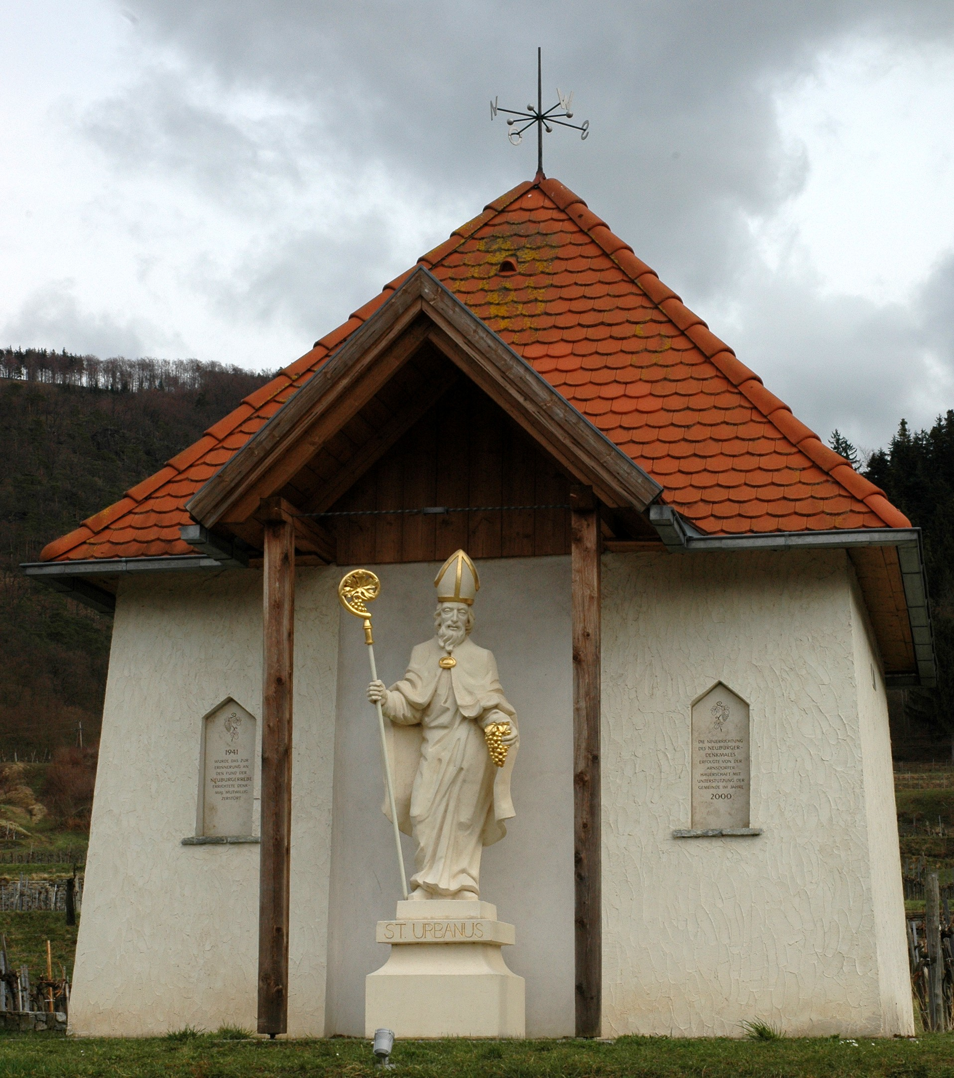 Neuburger Denkmal ab 2000